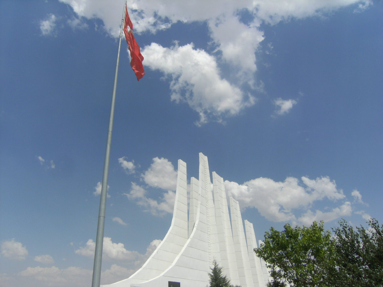 Sakarya zafer anıtı